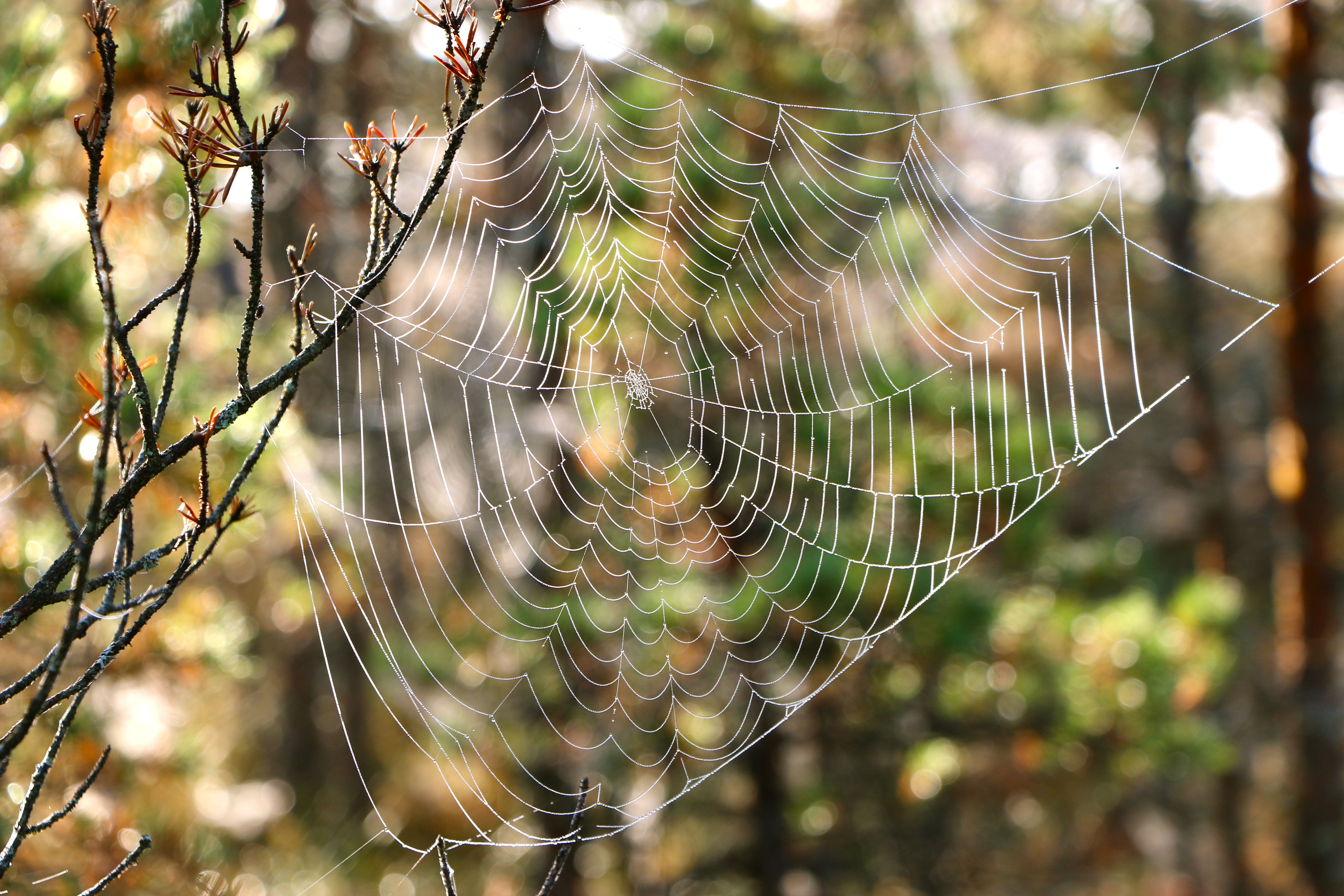 Pilt ämblikuvõrgust Kakerdaja rabas